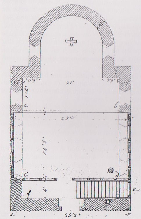 Gerlingen (Wenden), Pfarrkirche St. Antonius Einsiedler, Grundriss von 1734